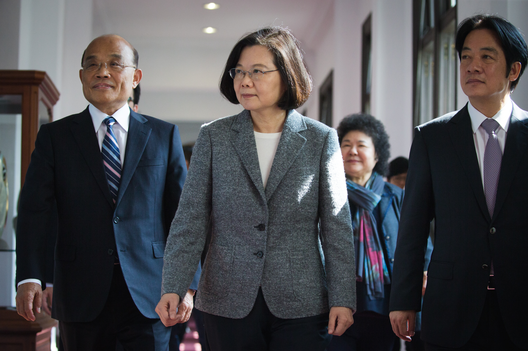 01.11 總統主持總統府記者會